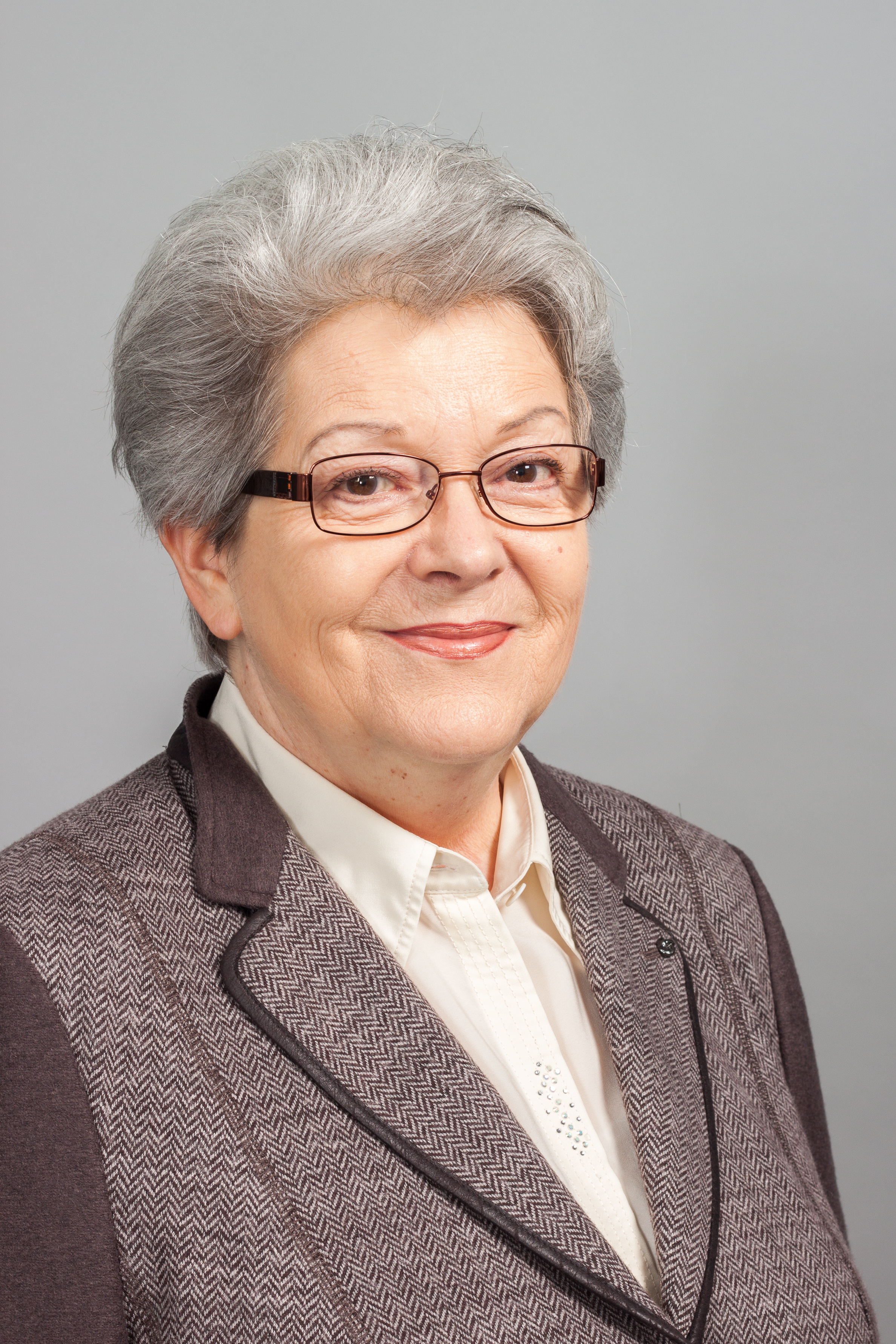 Abgeordnete des Sächsischen Landtages Edith Franke